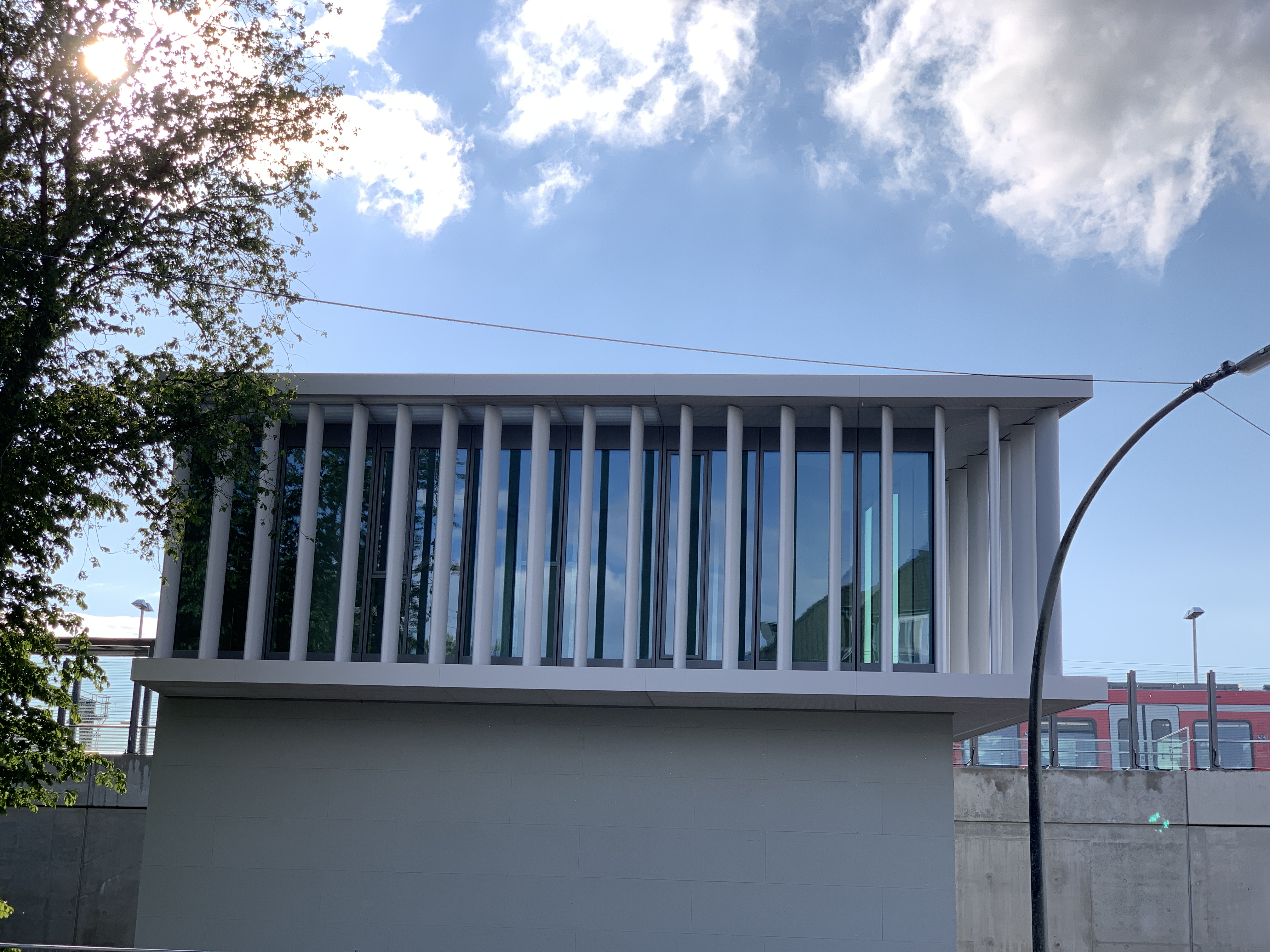 Musterfassade des Hochhauses Elbtower, Hamburg, aufgenommen im Juni 2020